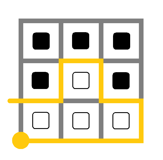 Exemple schématique de puzzle semblable à ceux présents dans le jeu "The Witness"